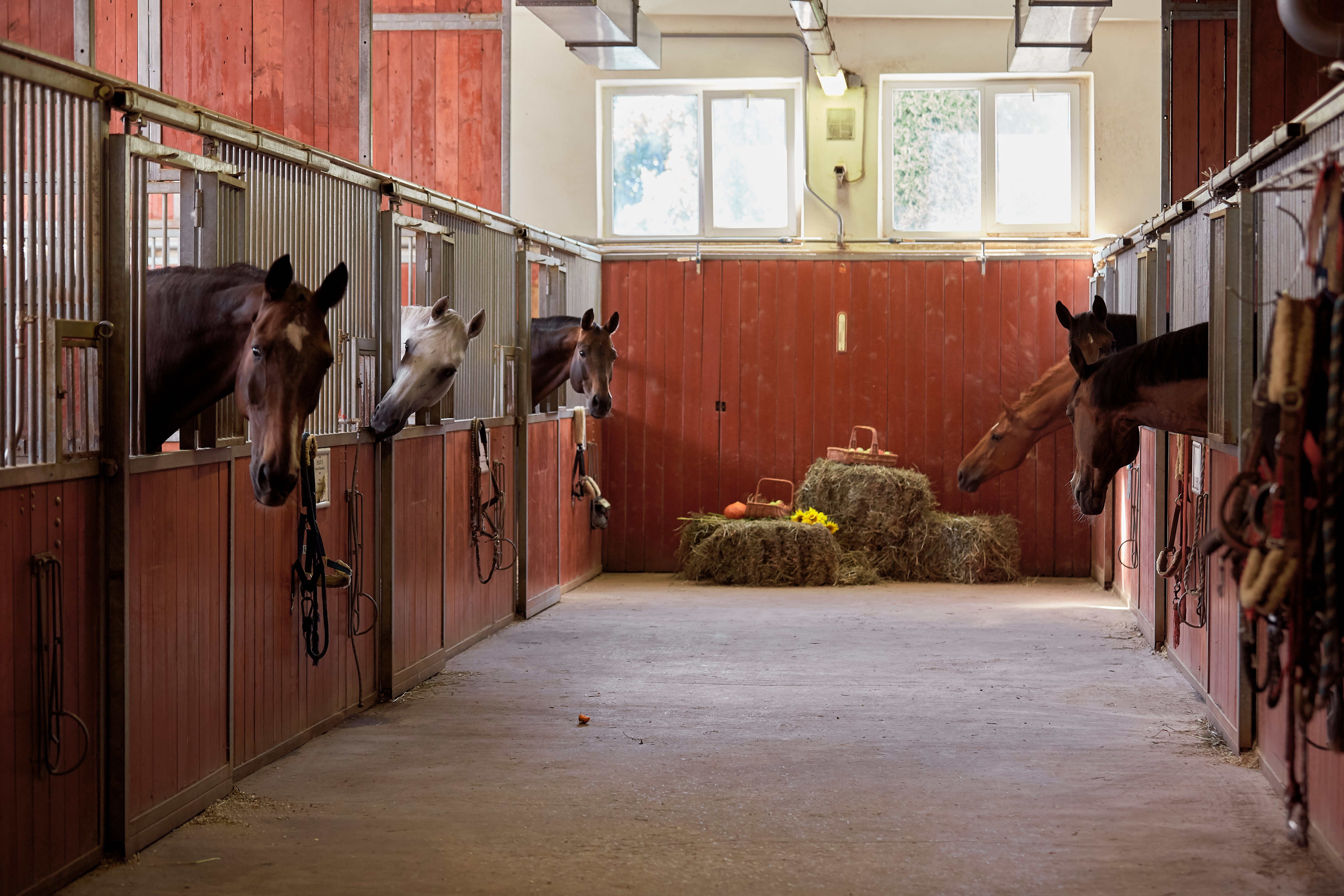 Конюшня. МКЗ №1